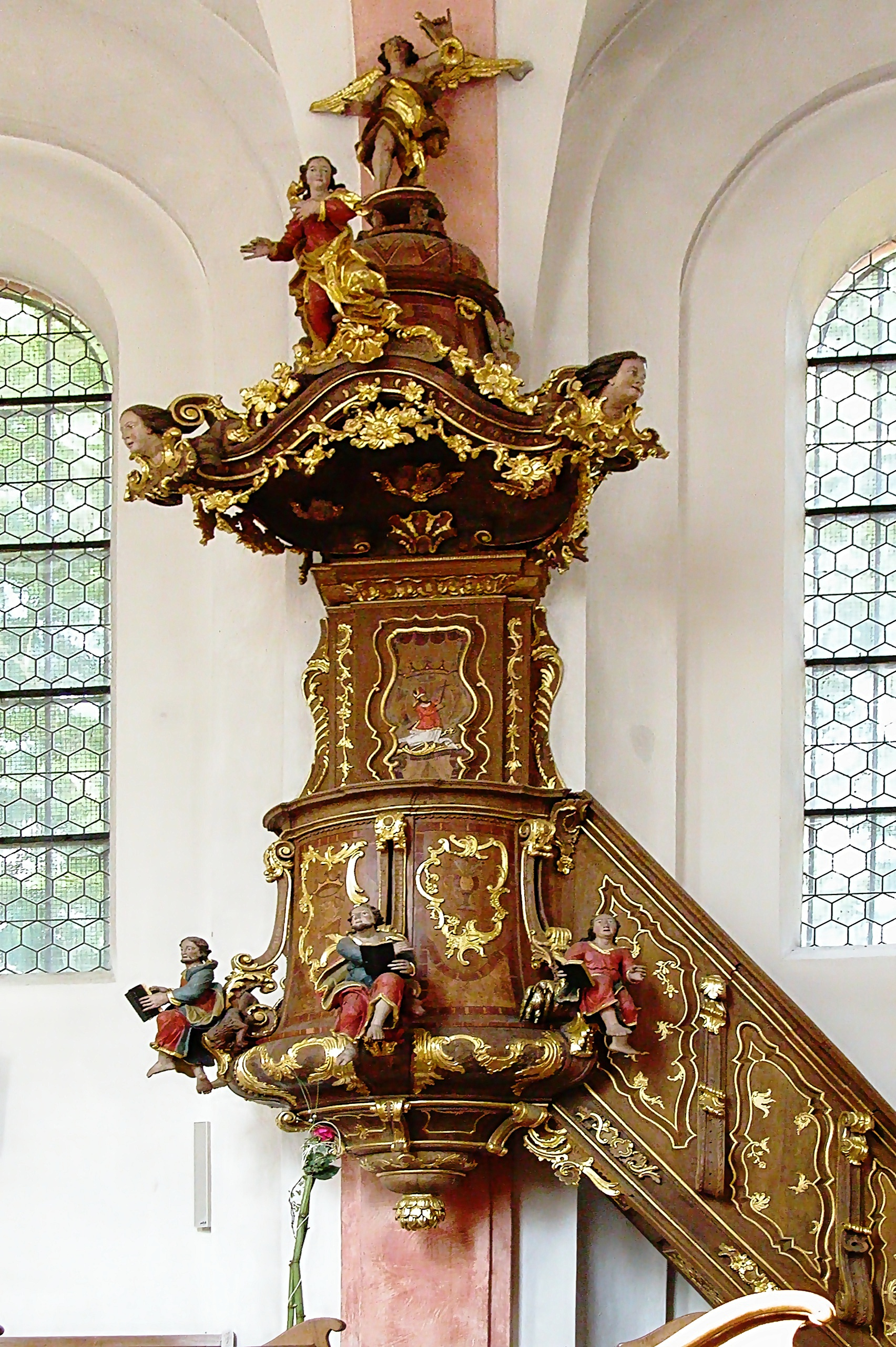 Schankweiler Klause auf dem Ferschweiler Plateau (Landkreis Bitburg-Prüm), Rheinland-Pfalz, Kanzel